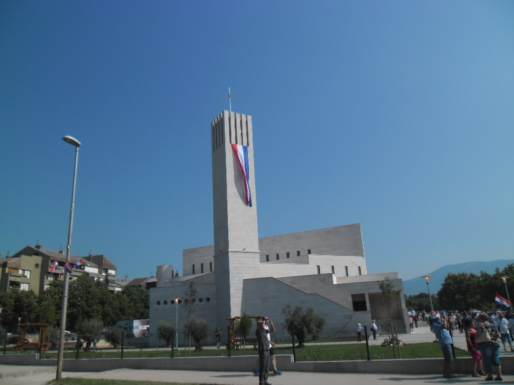 crkva u Kninu, Dan pobjede 2015.